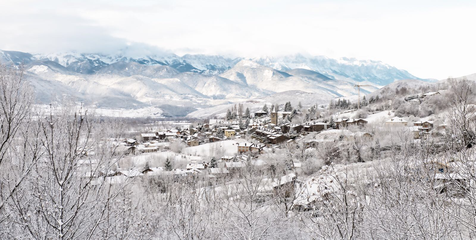 Paisatge de Bolvir Nevat a l'any 2017